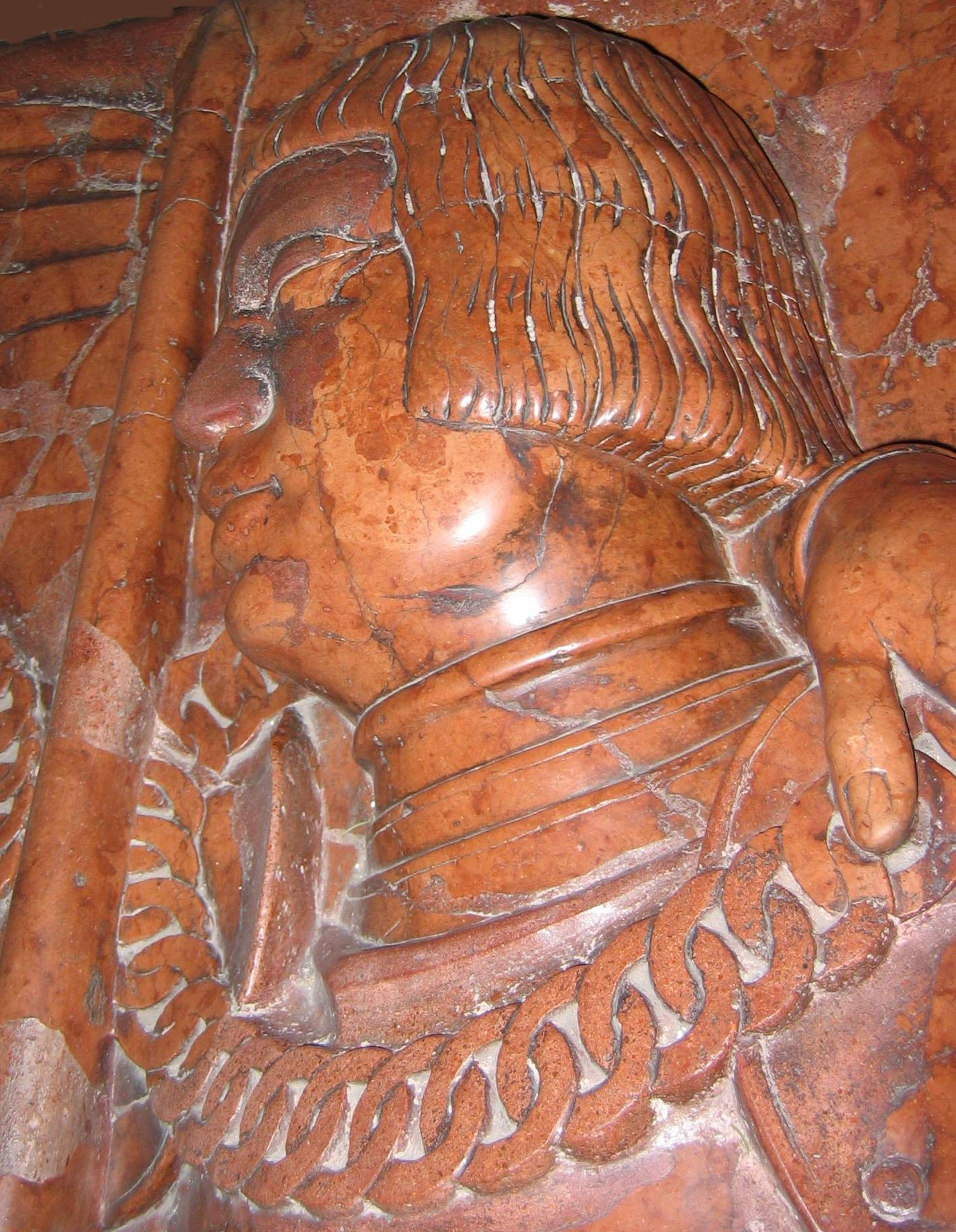 Stanisław Duke of Masovia author-Maciej Szczepańczyk-user:Mathiasrex